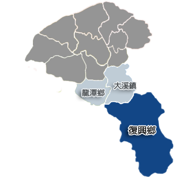 中文（台灣）: 桃園縣復興鄉行政區劃。